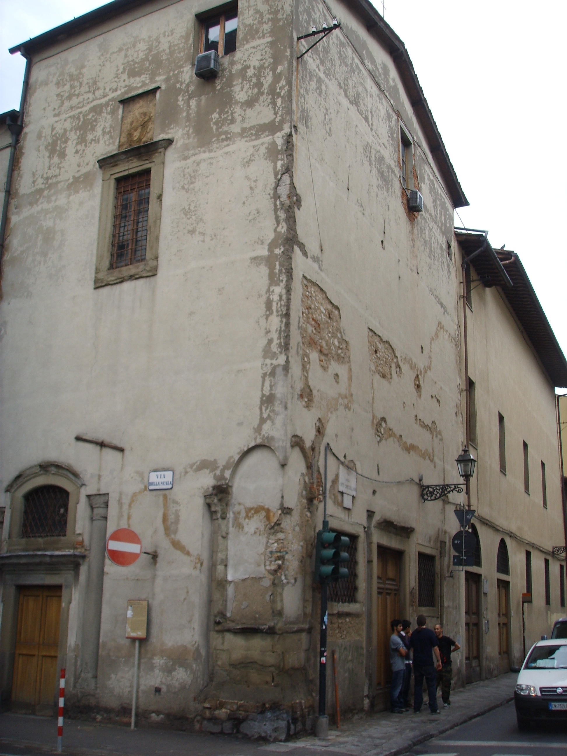 Santa maria della scala ex-church, outside, Florence, Italy